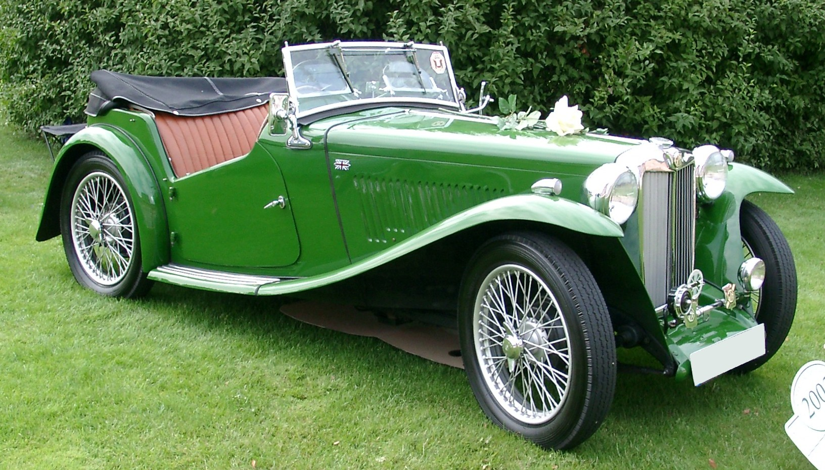 MG TA, Baujahr 1938. Fotografiert anläßlich des European Concours d'Elegance 2002 in Schwetzingen